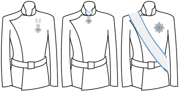 Modo di indossare le decorazioni dell'Ordine dell'Aquila Estense (Ducato di Modena)